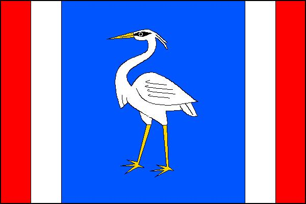 Vlajka obce Branišovice